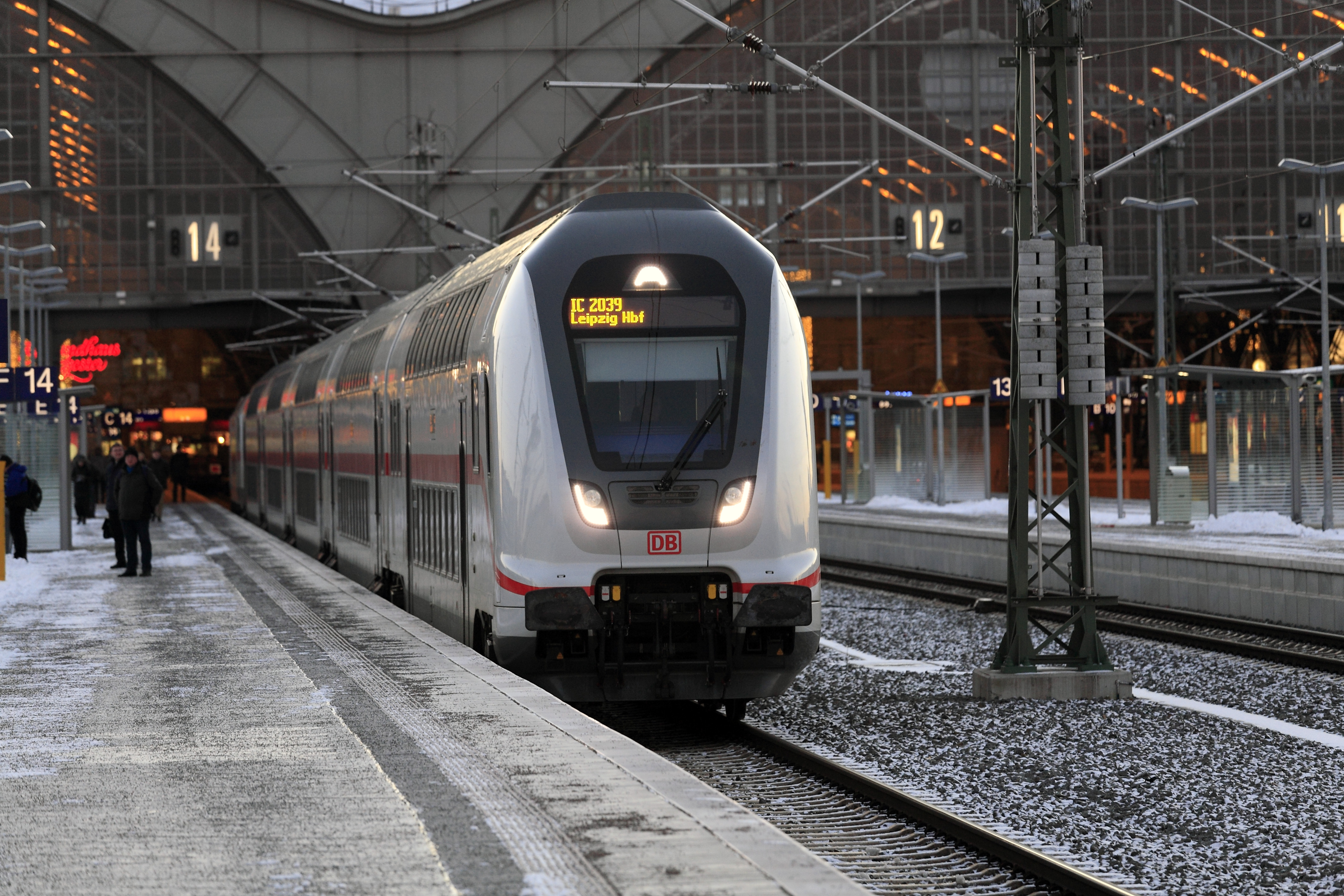 Der eingefahrene Fernbahndoppelstockzug fährt in die Abstellgruppe, die Zugzielanzeige ist noch nicht gelöscht.